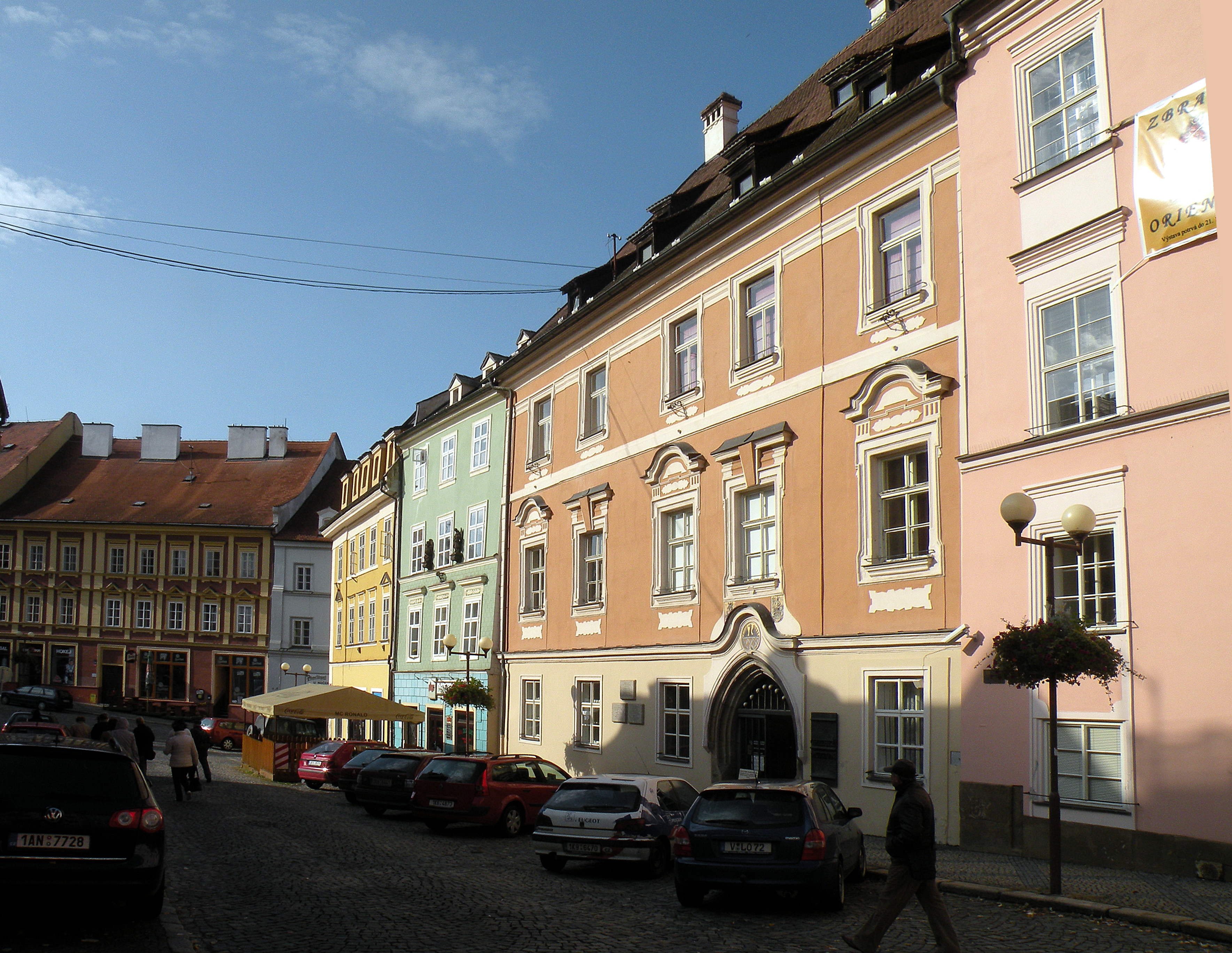 Хеб.Эгер. Здесь был убит Валленштейн. (Ныне здесь музей)